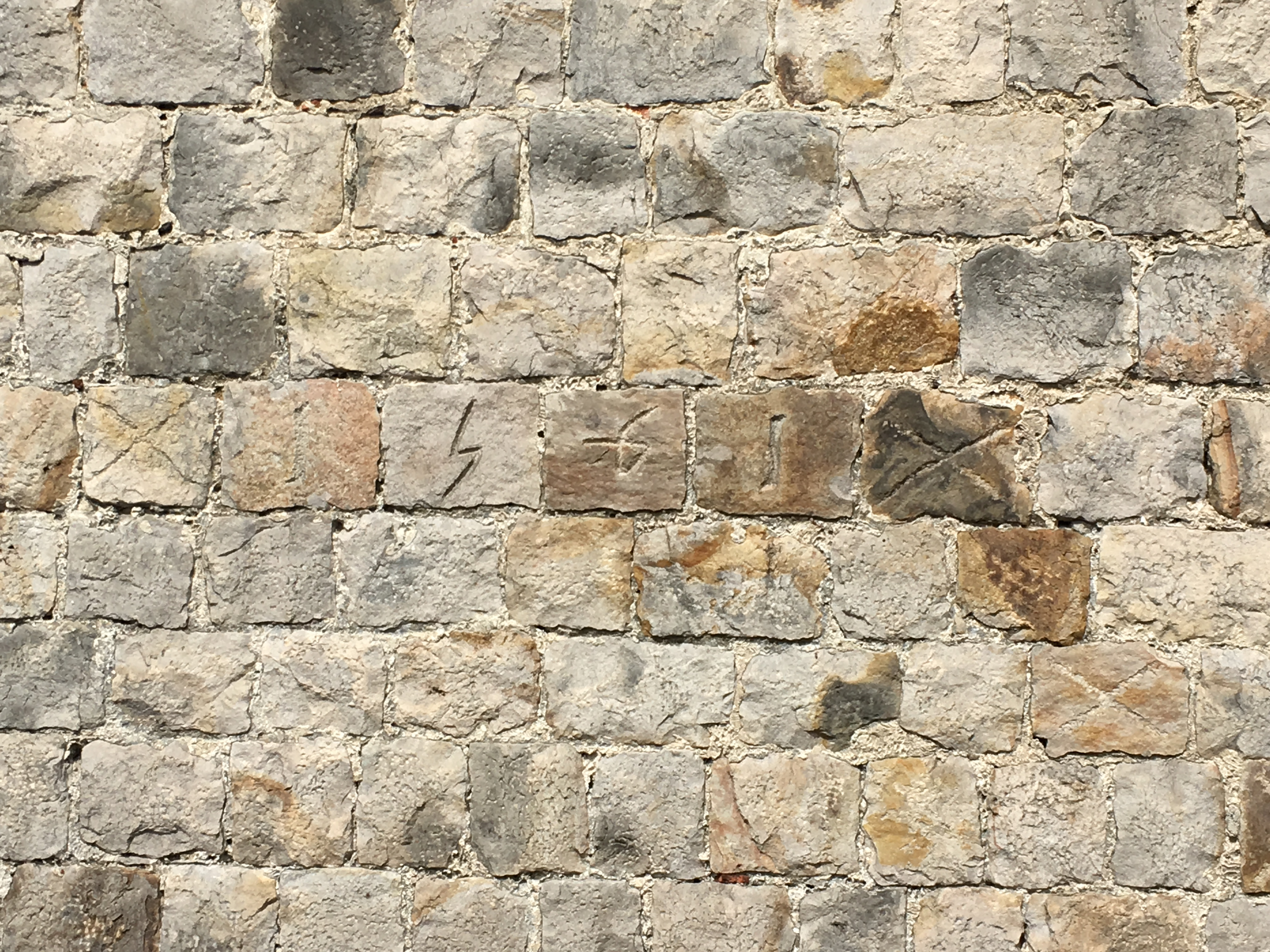 Datation